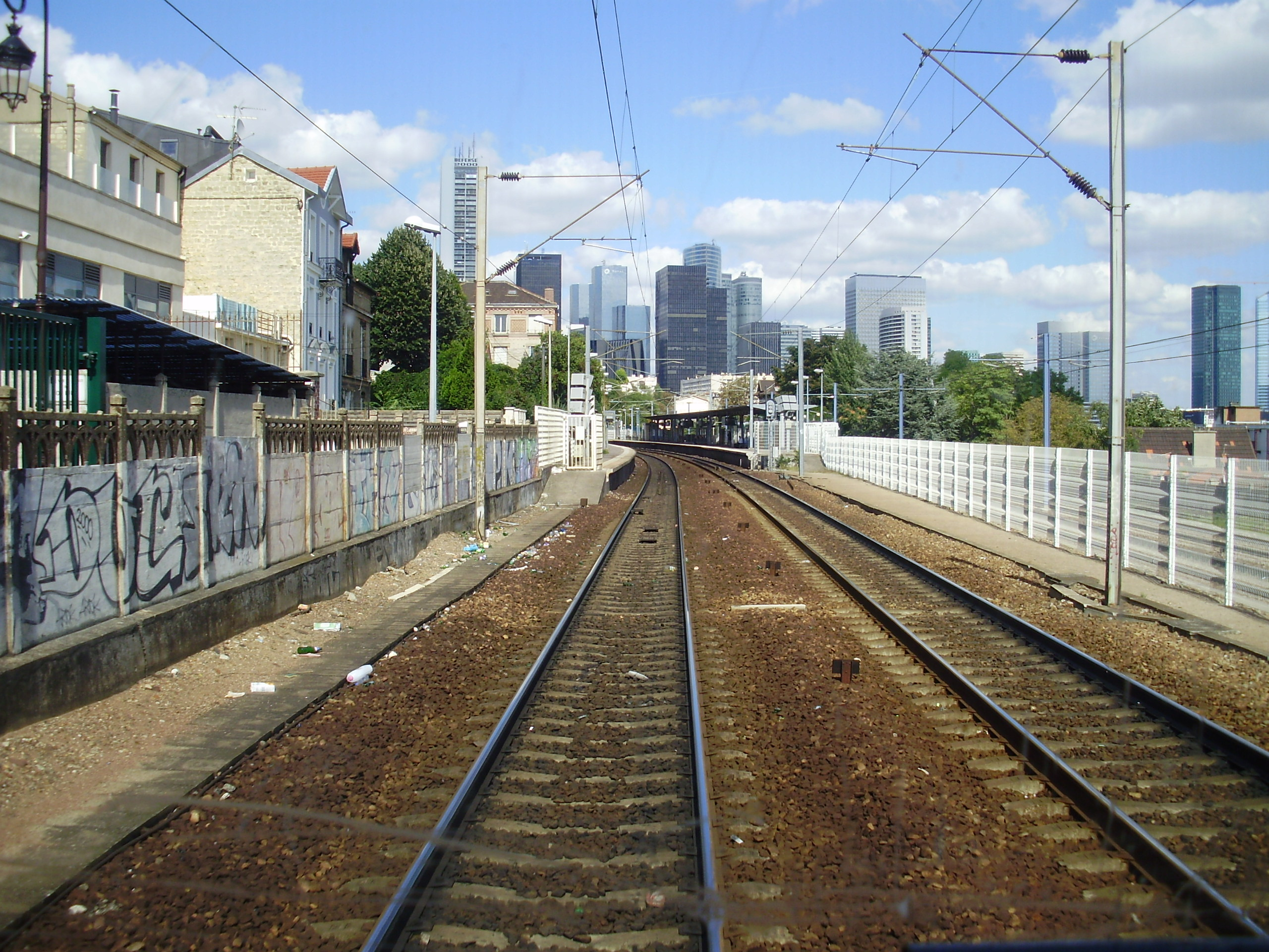 Vue de la ligne Paris-Saint-Lazare – Versailles-Rive-Droite depuis la cabine de conduite d'une rame Z 6400, en arrivant en gare de Puteaux, Hauts-de-Seine, France, en provenance de Suresnes - Mont-Valérien avec, en arrière-plan, les tours de la Défense.